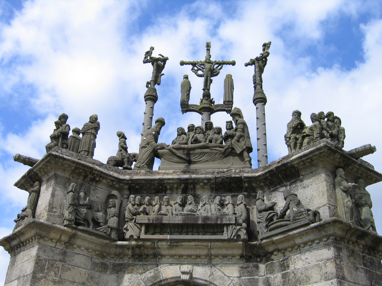 Calvaire situé dans l'enclos paroissial de Pleyben (Bretagne, France)